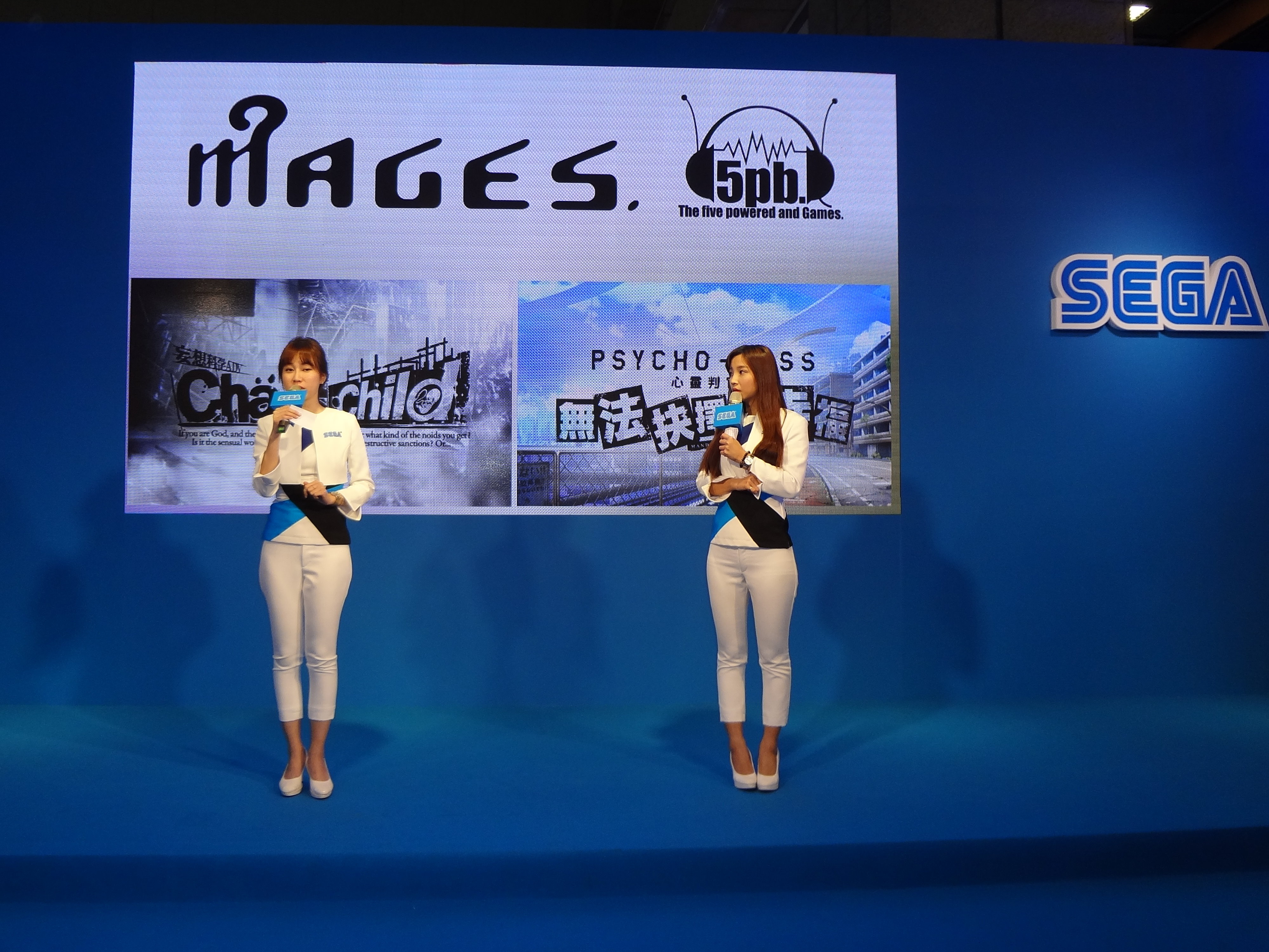 2017臺北國際電玩展，世嘉攤位的宣傳模特兒宣傳MAGES.旗下品牌5pb.的遊戲軟體。